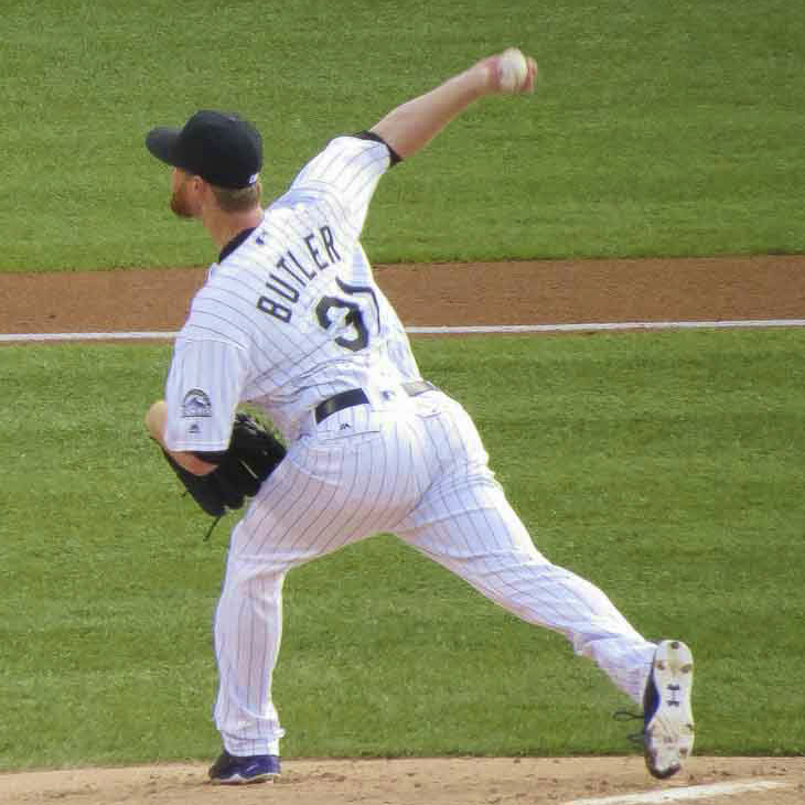 Eddie Butler